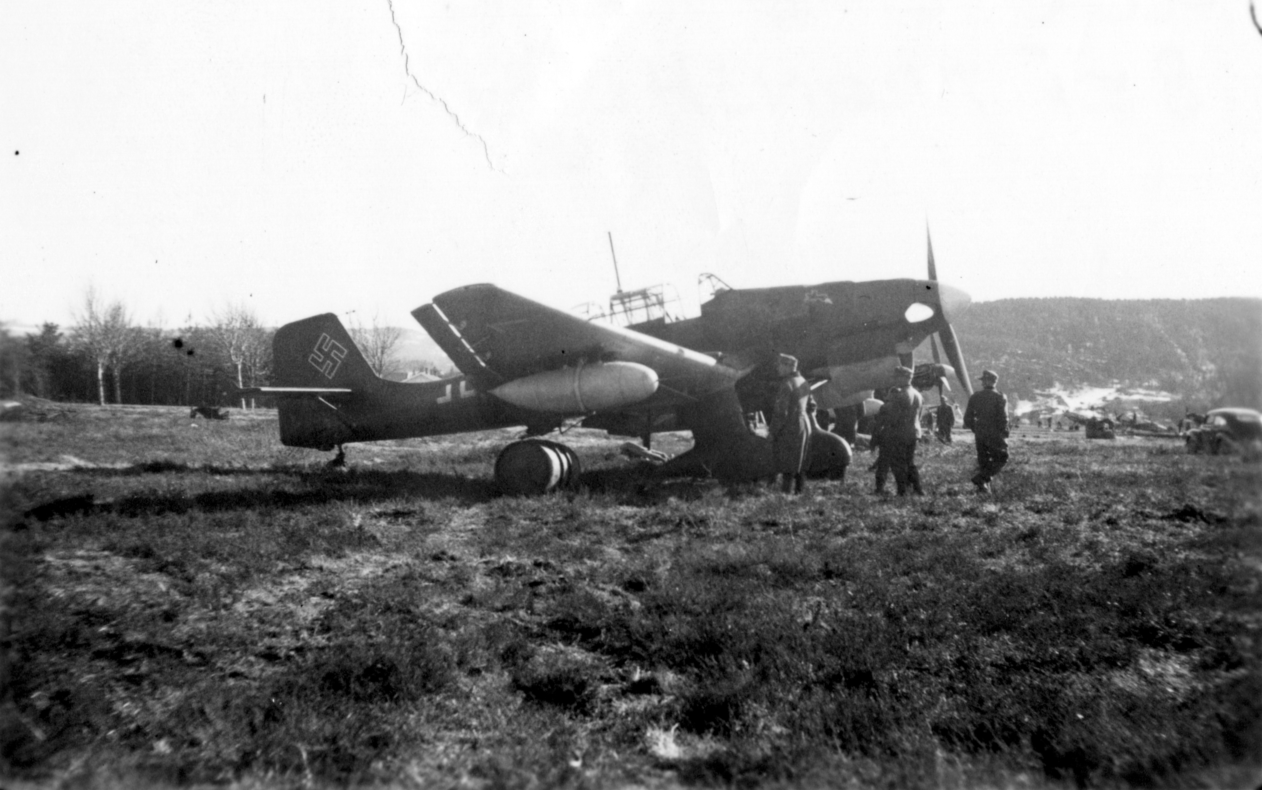 Tysk Junkers Ju 87 kampfly på Værnes Tittel / Title: Værnes flyplass tysk jagerfly 1940, 02. mai Dato / Date: 02.05.1940 Fotograf / Photographer: Ukjent/Unknown Sted / Place: Værnes Eier / Owner Institution: Arkiv i Nordland Lenke / Link: Arkiv i Nordland Arkivreferanse /Archive reference: AIN.NA143.0252 Fra Dag Skogheims Privatarkiv Tekst bak på bildet: Flugplatz Hell bei Trondheim